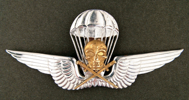 Magyar Királyi Honvédség Ejtőernyős Jelvény oxidált változat